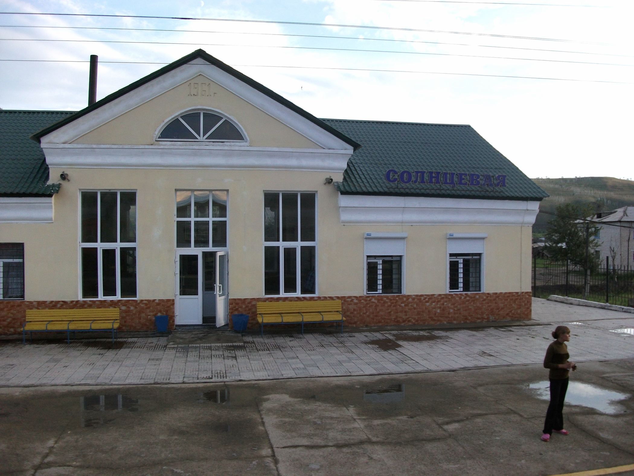 Железнодорожная станция Солнцевая (ЗАБ ЖД)